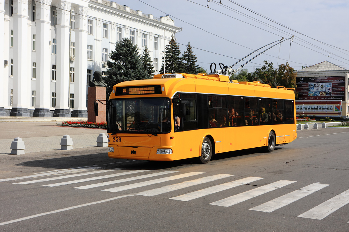 Троллейбус АКСМ-321 на маршруте №19. Тирасполь, улица 25 Октября